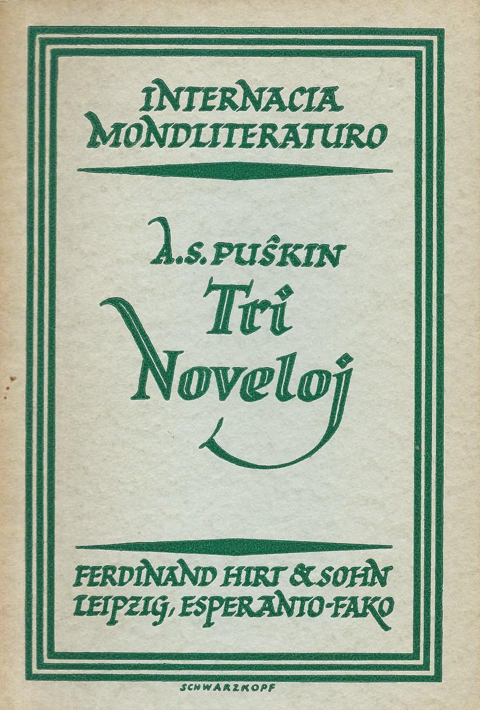 librokovrilo de "Tri Noveloj", 1923